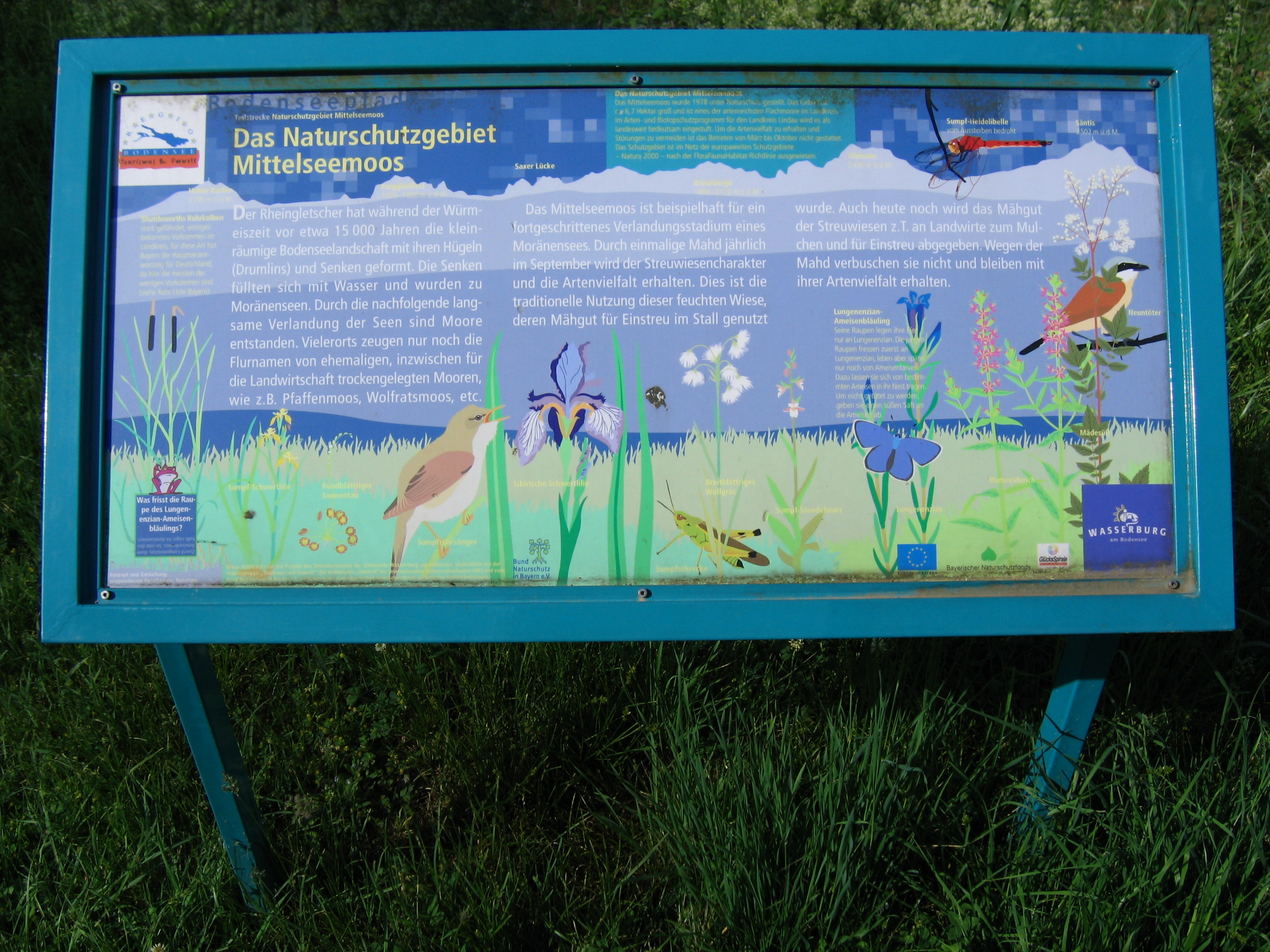 Infotafel Bodenseepfad in Wasserburg: NSG Mittelseemoos